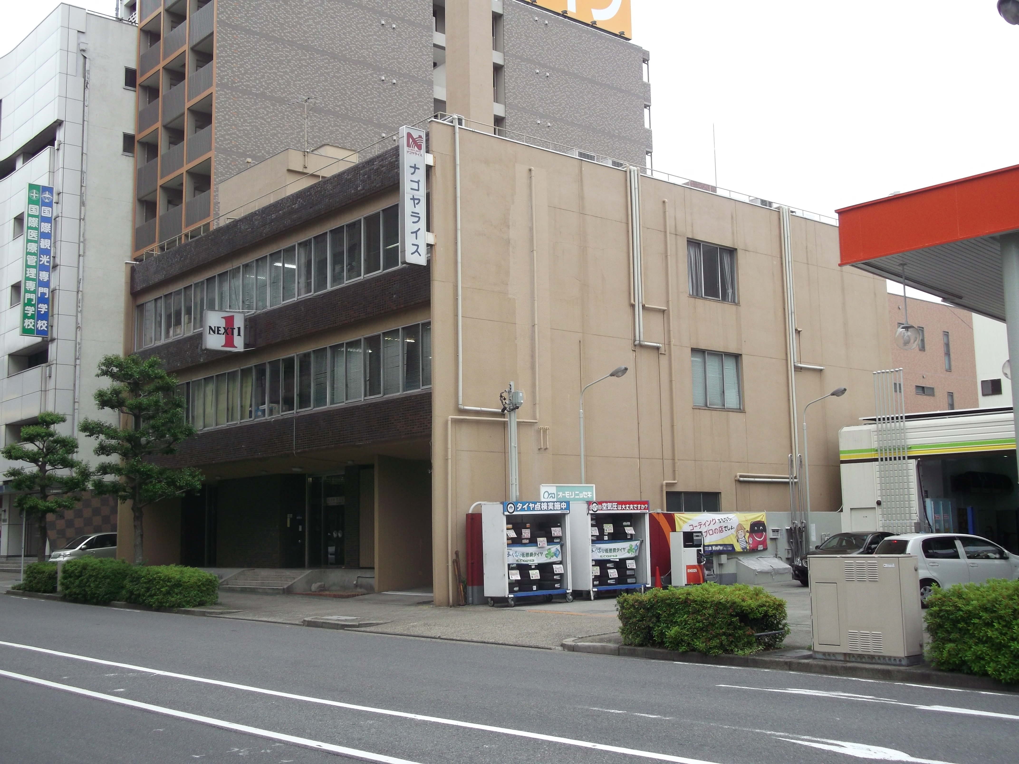 名古屋市中村区名駅南にある名古屋食糧本社を北側公道西側より写す